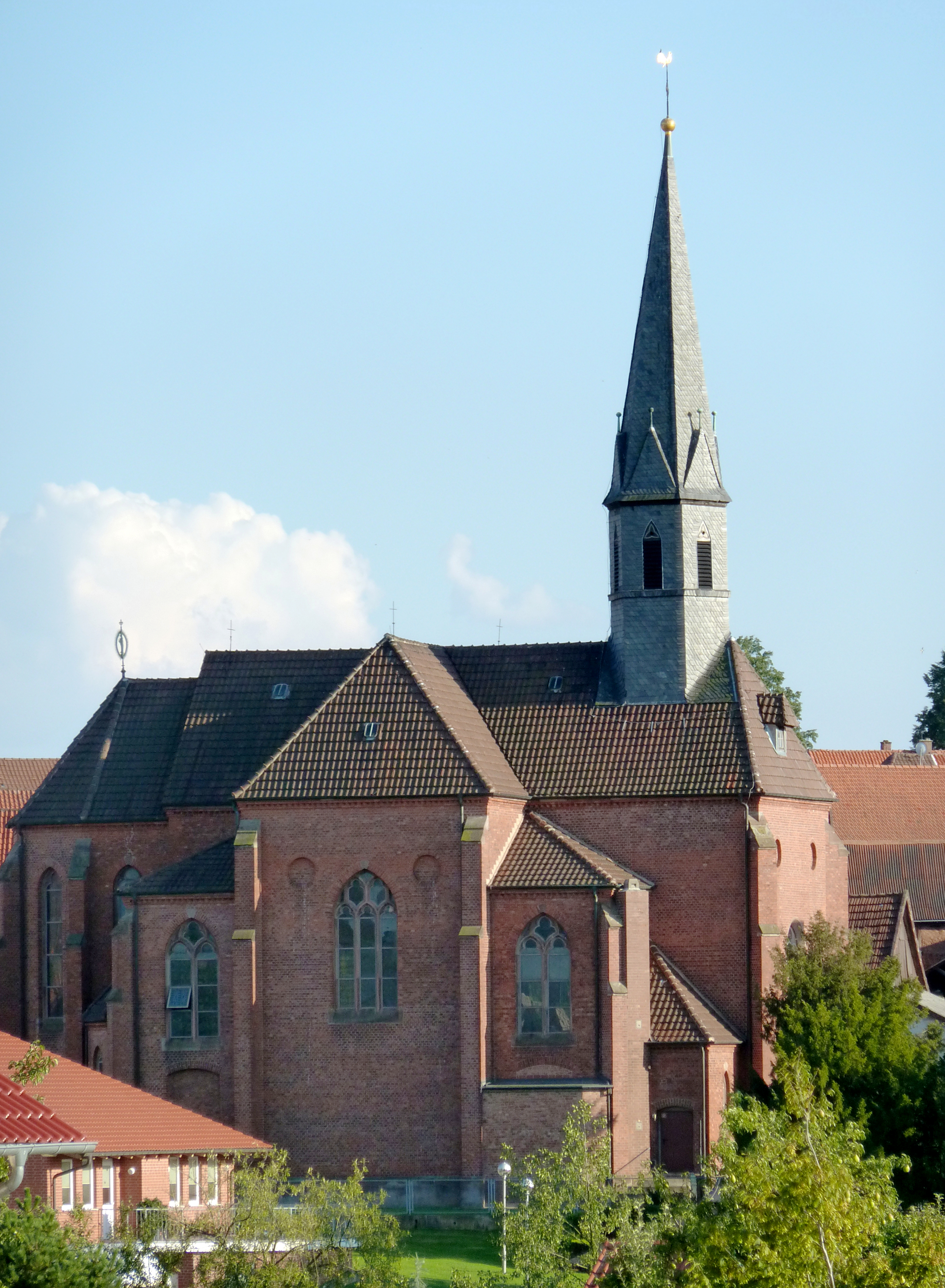 Katholische Pfarrkirche Mariä Verkndigung in Breitenberg, Stadt Duderstadt, Niedersachsen. Neugotischer Backsteinbau, erbaut 1896 durch Paschalis Gratze anstelle des Vorgängerbaus von 1709/1780